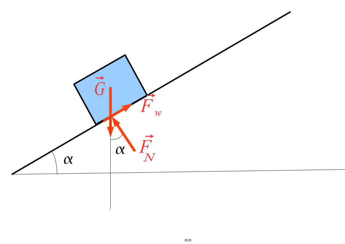 Ruwe meting van de wrijvingscoëffiënt